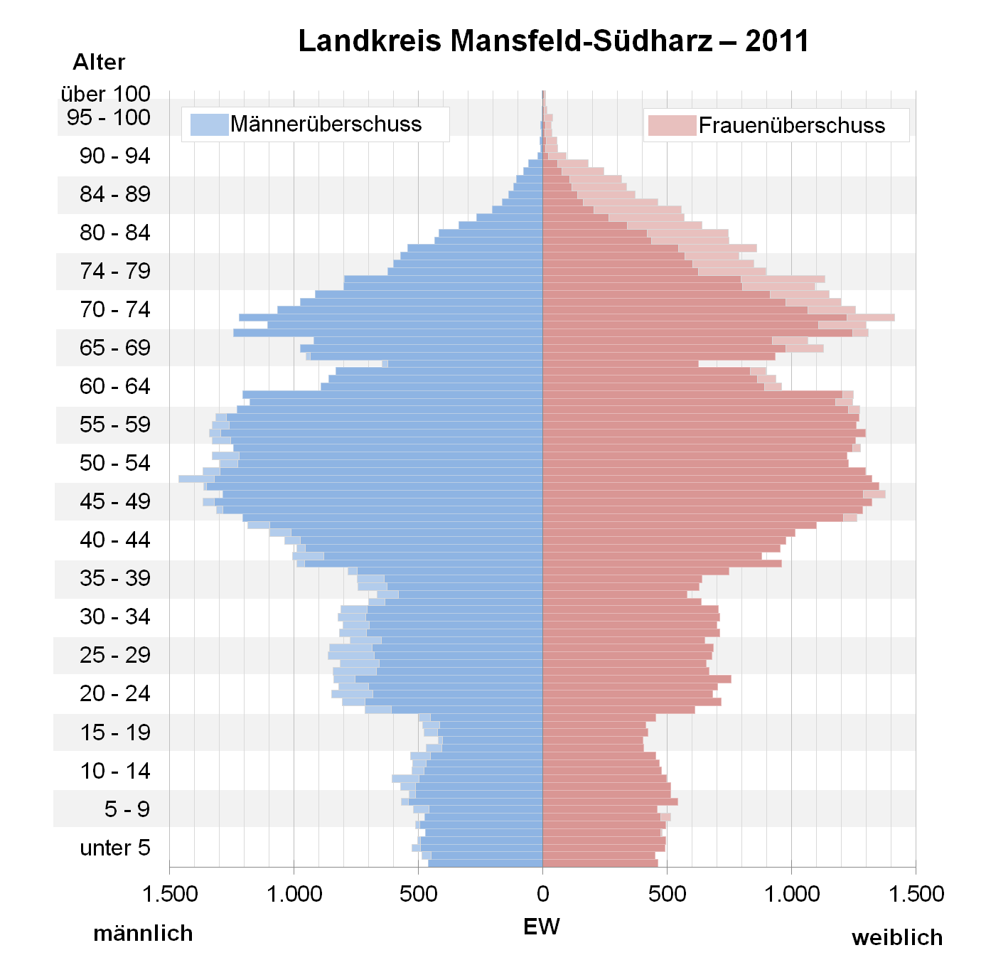 Bevölkerungspyramide des Landkreises Mansfeld-Südharz nach Zensus 2011.